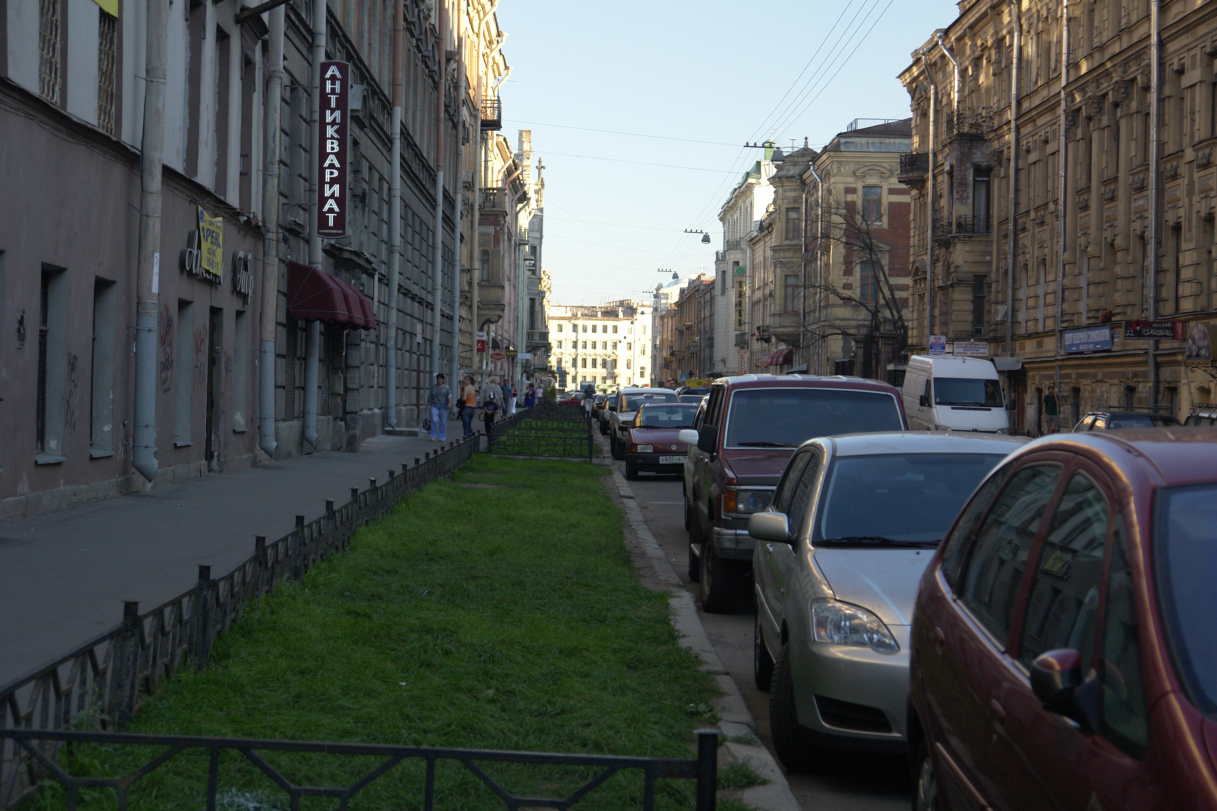 Моховая улица, Санкт-Петербург. Вид с улицы Пестеля в сторону улицы Белинского (направление на Невский проспект).